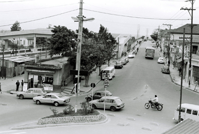 Poá nos anos 70